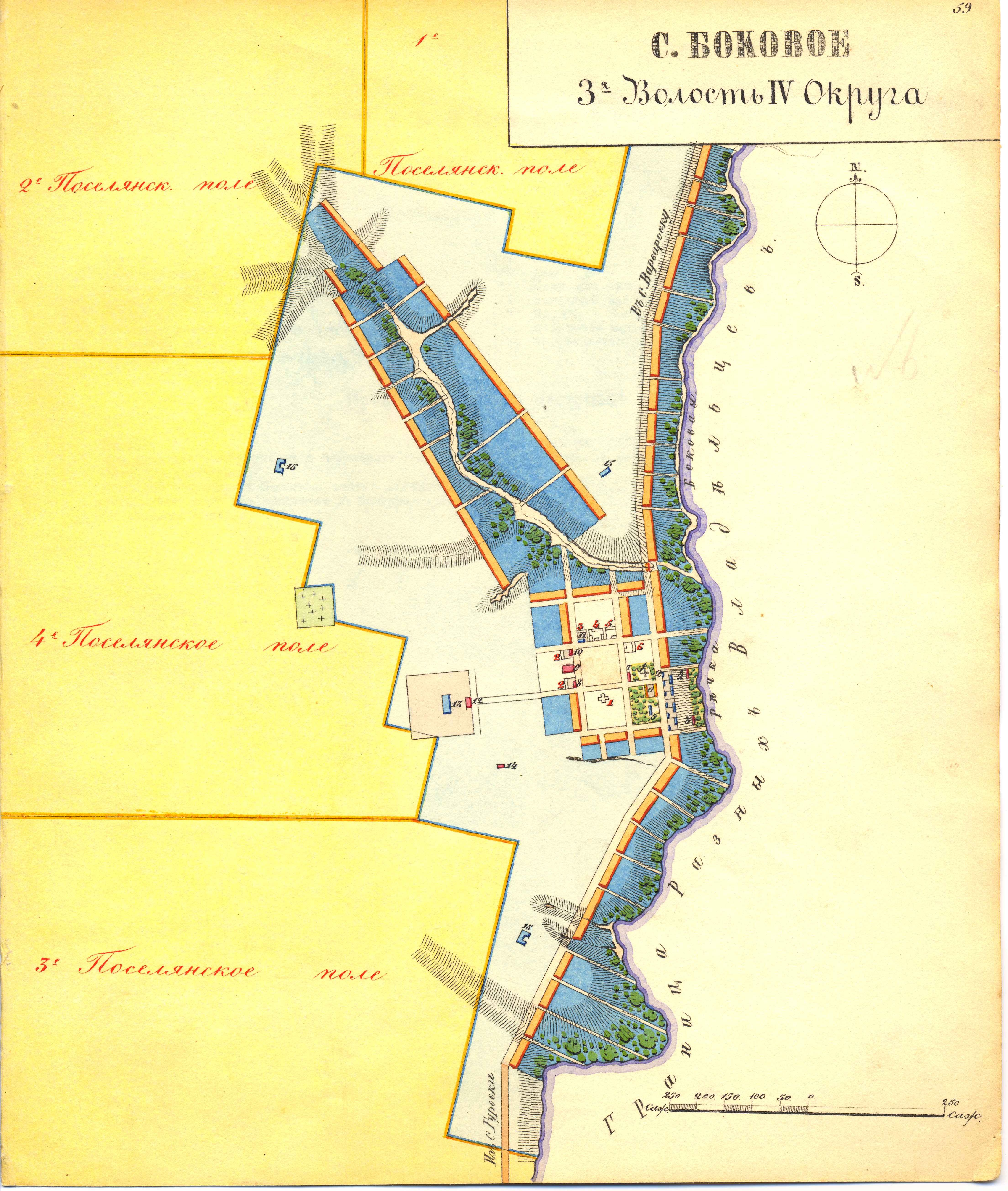 План села Бокового під час військового поселення